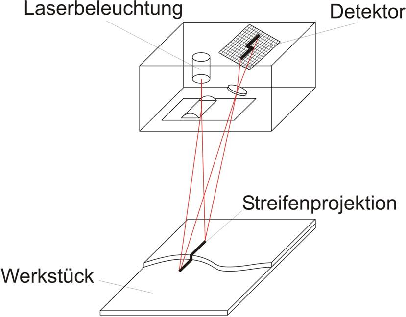 Lichtschnittsensor